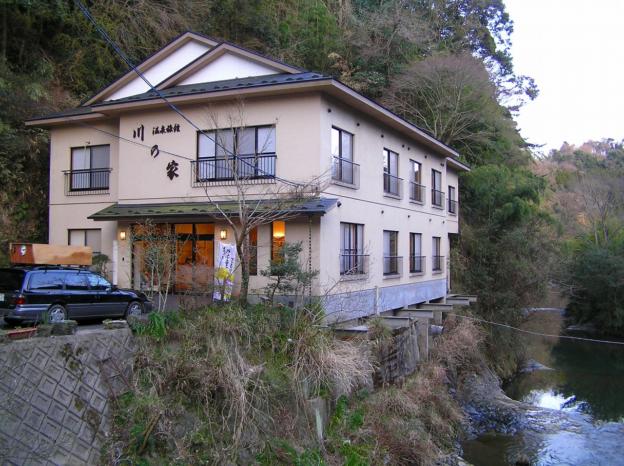 養老渓谷温泉「川の家」漫画家のつげ義春が宿泊